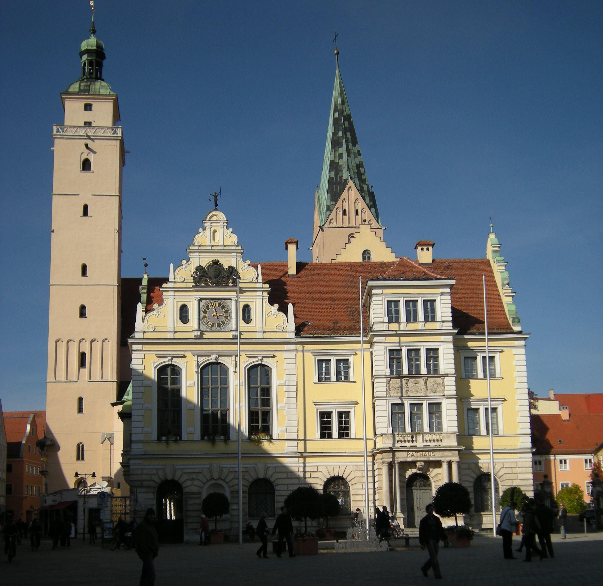 Ingolstadt - Rathausplatz mit Altem Rathaus und Turm der Moritzkirche